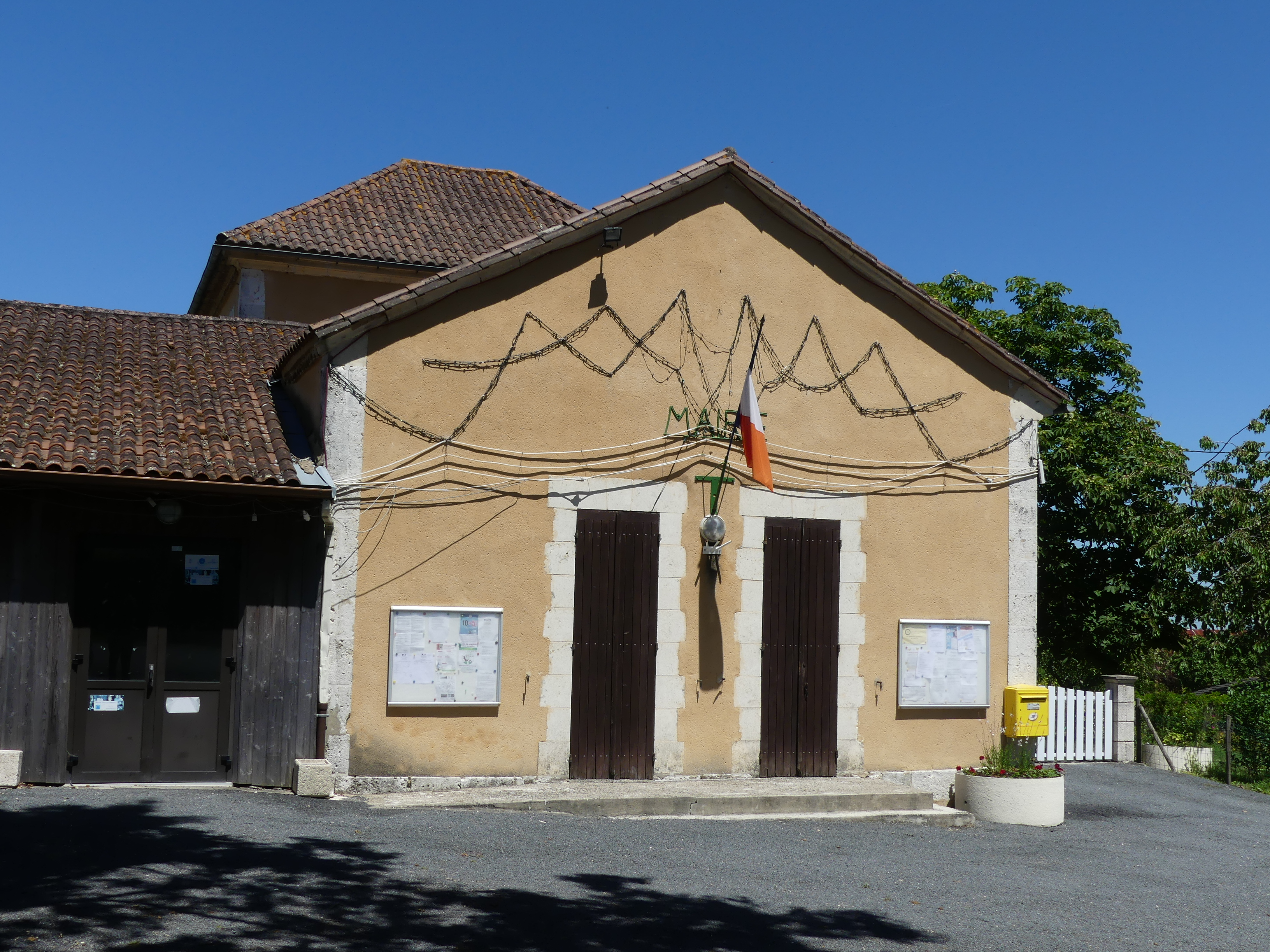 La mairie de Saint-Perdoux, Dordogne, France.